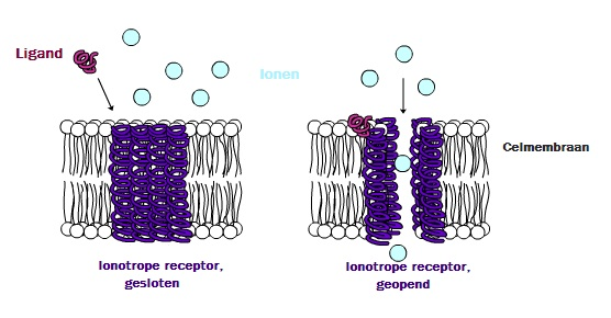 plaatje van een ionotrope receptor